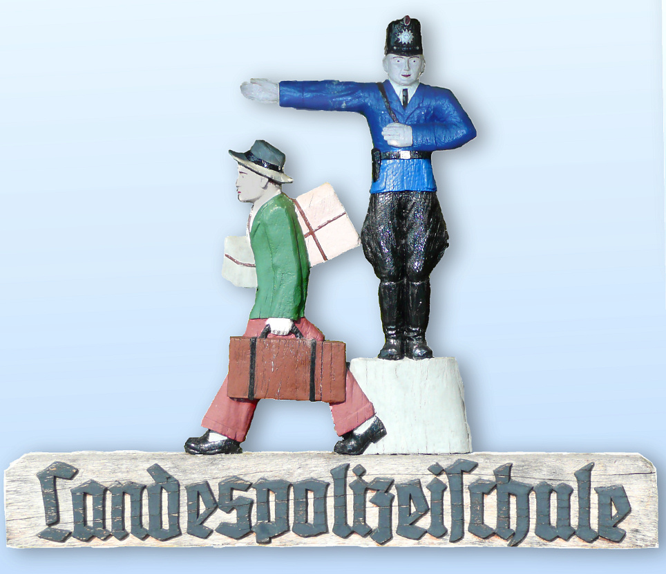 Schild der früheren Polizeischule Hann. Münden, heute Polizeiakademie